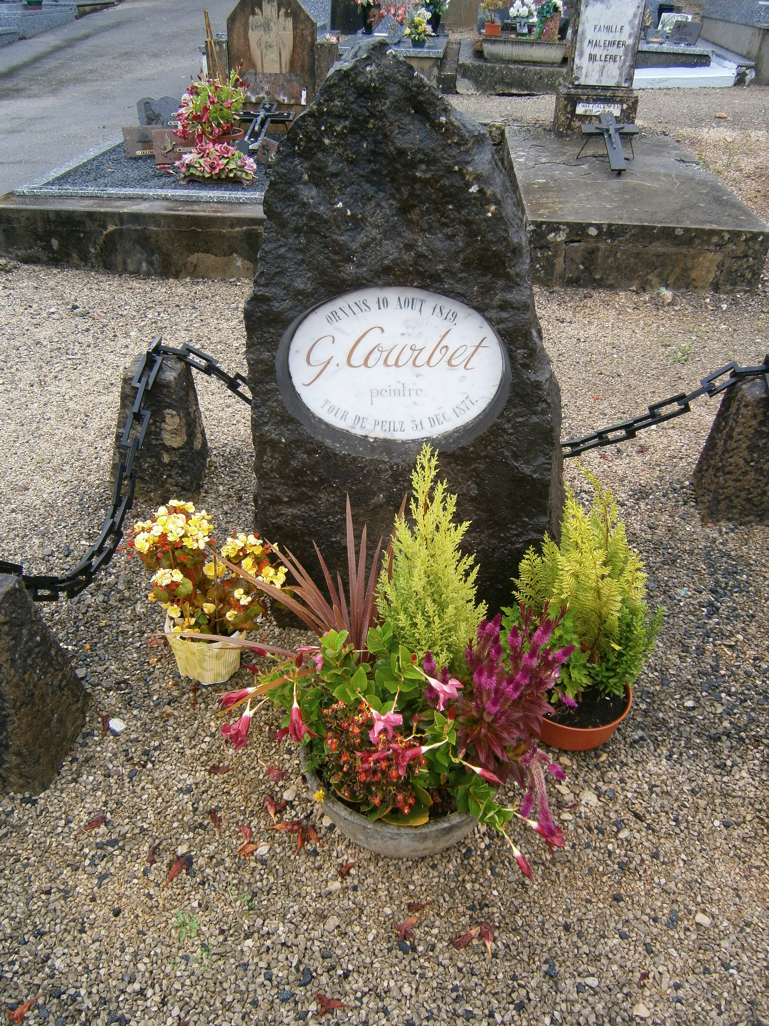 Cimetière d'Ornans, stèle à Gustave Courbet.